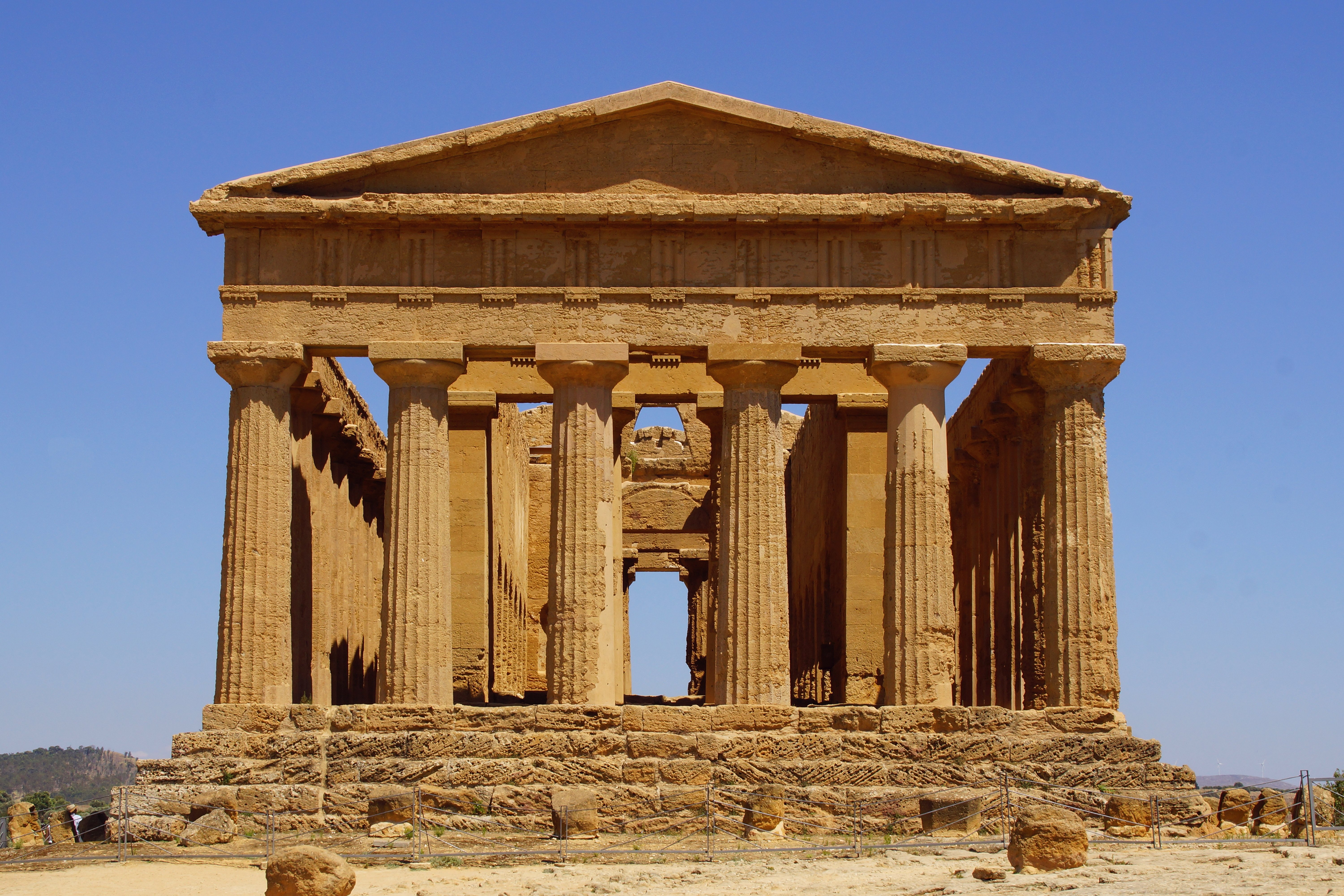 Concordiatempel etwa 440 bis 430 v.Chr. (Ansicht von Westen/Dreiecksgiebel bzw. Propyläen) im Tal der Tempel in Agrigent, Sizilien - Tempio della Concordia - Temple of Concordia - Temple de la Concorde - Valle dei Templi Agrigento Sicilia Foto Wolfgang Pehlemann DSC07490 6000 × 4001, 4 MB